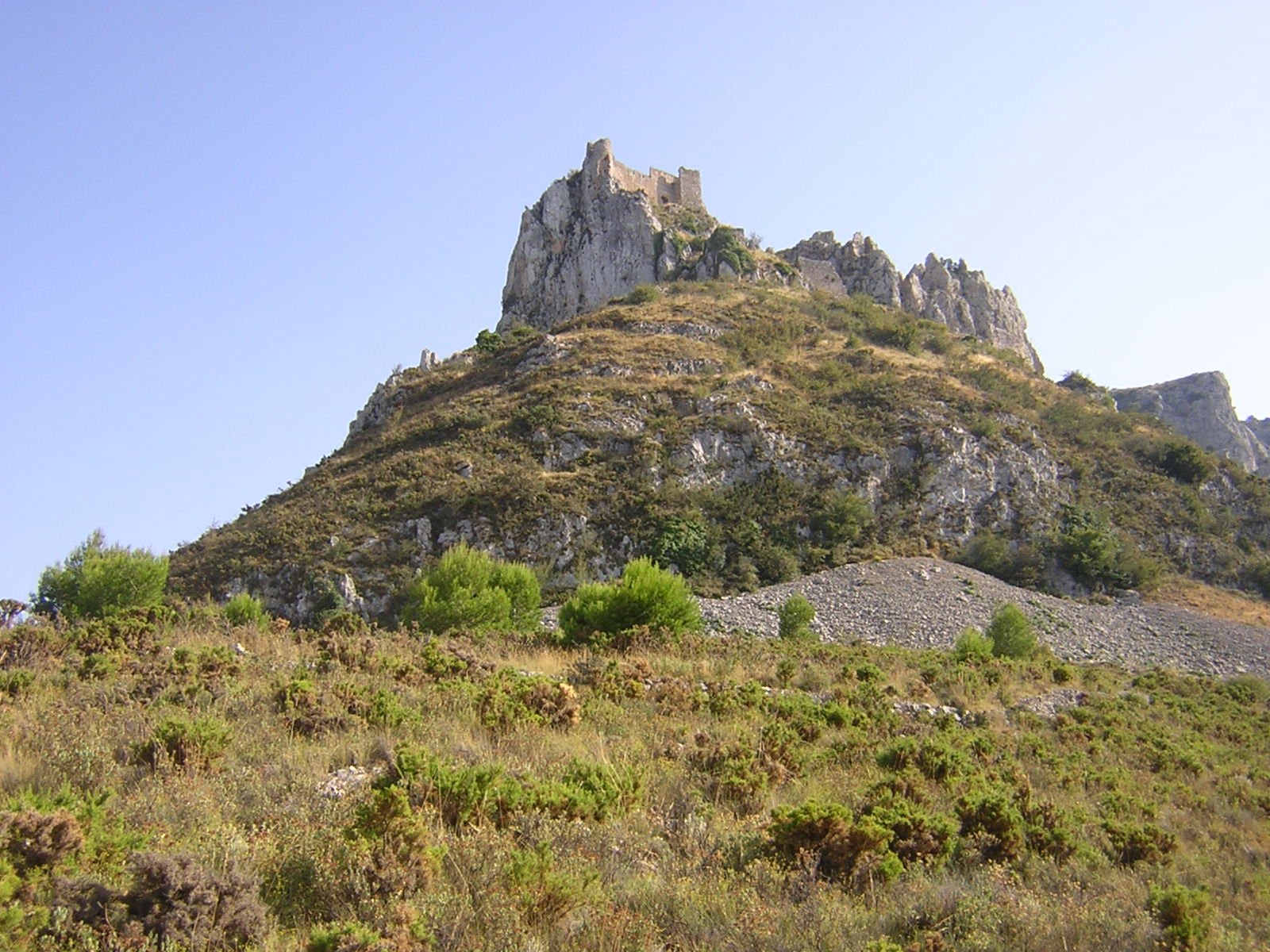 Castell d'Alfofra als municipis de Benifato i Confrides (la Marina Baixa, País Valencià)